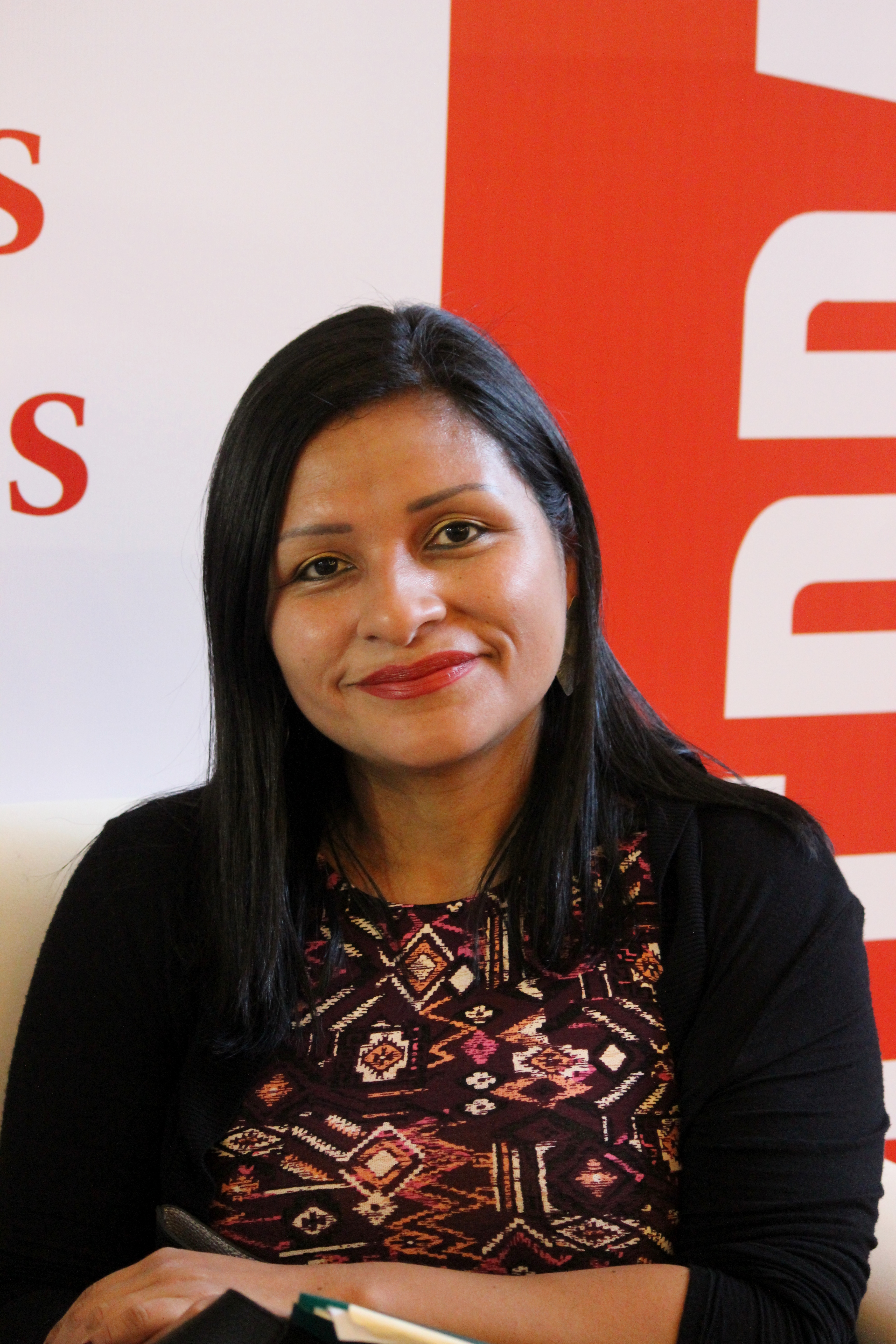 La poetisa peruana Denisse Vega Farfán durante la presentación de su libro El primer asombro en la Feria Internacional del Libro de Santiago 2018 (sala Camilo Mori, 4 de noviembre).